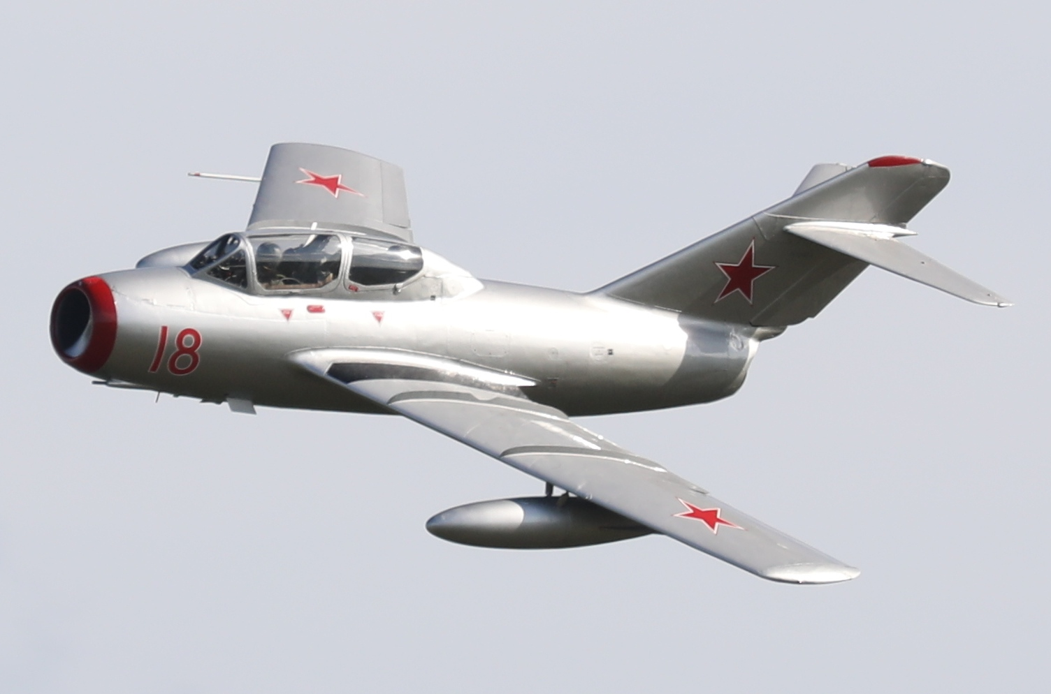 mig1